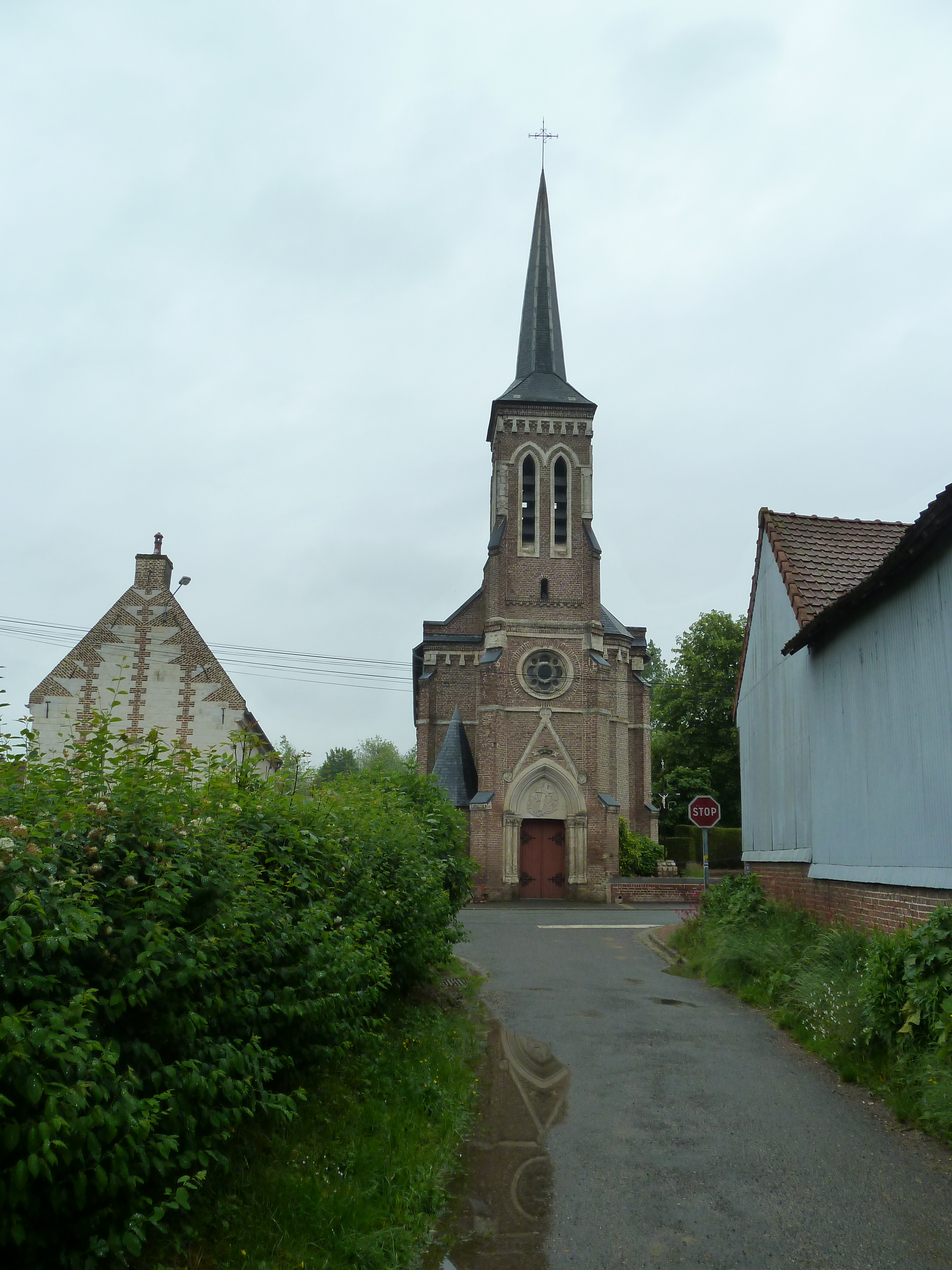 Thièvres (Somme) Somme (département), France